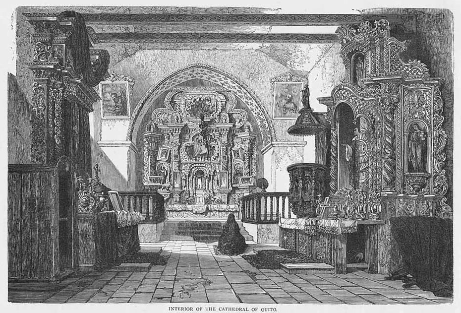 Dibujo del interior de la Catedral de Quito como lucía alrededor de 1860. Publicado originalmente en "Viajes Ilustrados" de HW Bates, para Le Tour Du Monde (París, 1867).